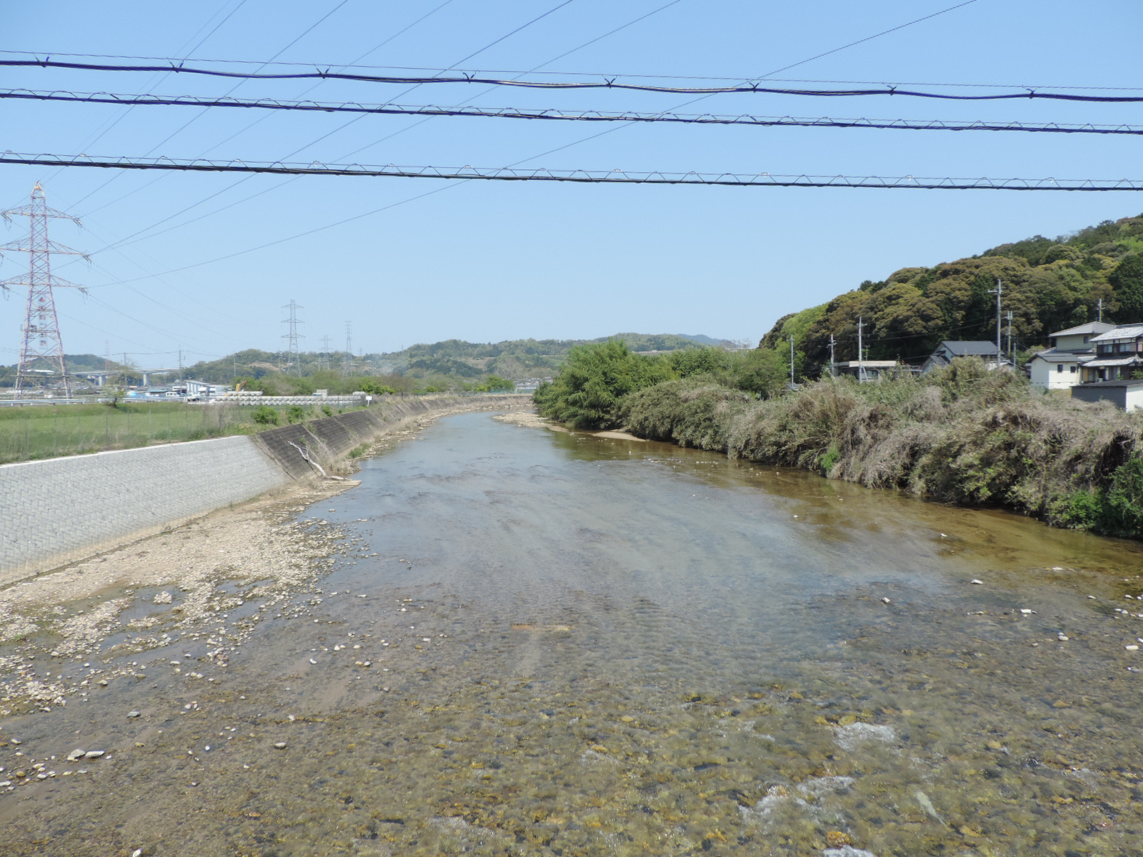 荒戸橋より望む大戸川（滋賀県大津市、2020年5月撮影）